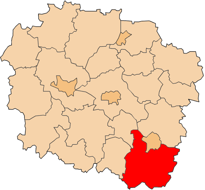 Powiat włocławski na mapie województwa kujawsko-pomorskiego.